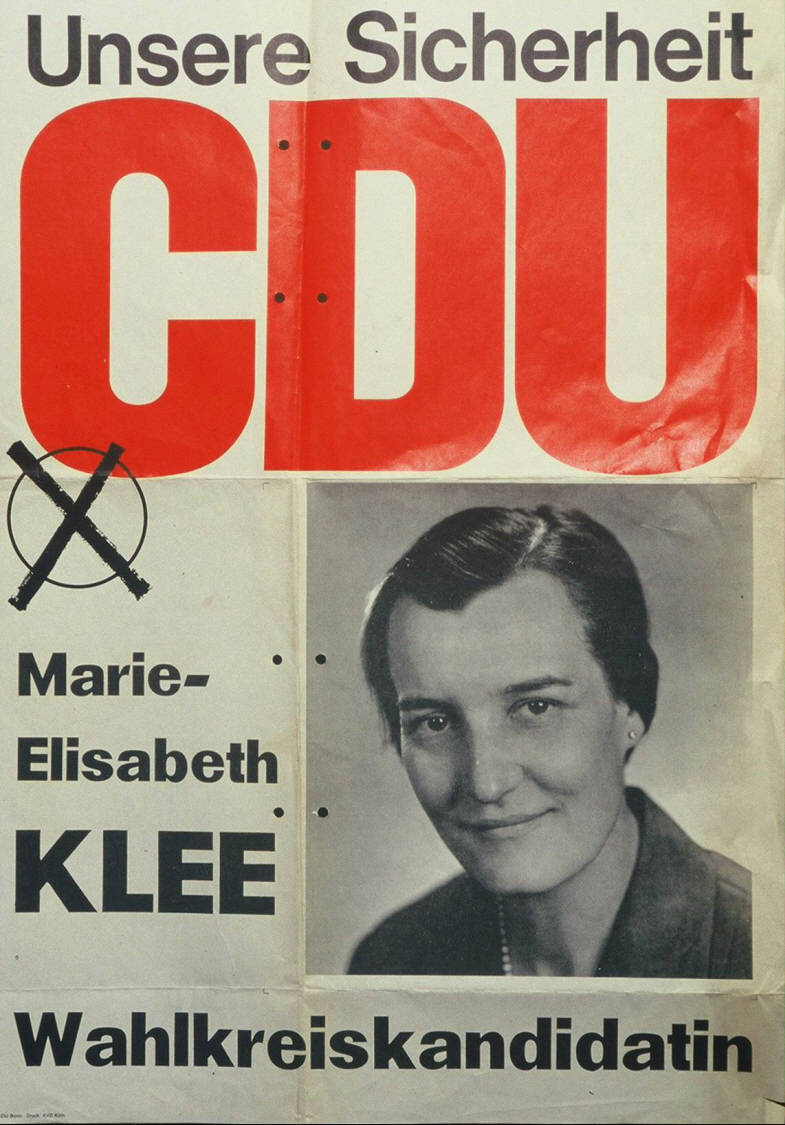 Unsere Sicherheit CDU Marie-Elisabeth Klee WahlkreiskandidatinAbbildung:Porträtfoto - StimmkreuzPlakatart:Kandidaten/Personenplakat mit Auftraggeber:CDU BonnDrucker_Druckart_Druckort:KVD KölnObjekt-Signatur:10-001: 1277Bestand:Plakate zu Bundestagswahlen (10-001)GliederungBestand10-18:Plakate zu Bundestagswahlen (10-001) » Die 5. Bundestagswahl am 19. September 1965 » CDU » Mit PorträtfotoLizenz:KAS/ACDP 10-001: 1277 CC-BY-SA 3.0 DE